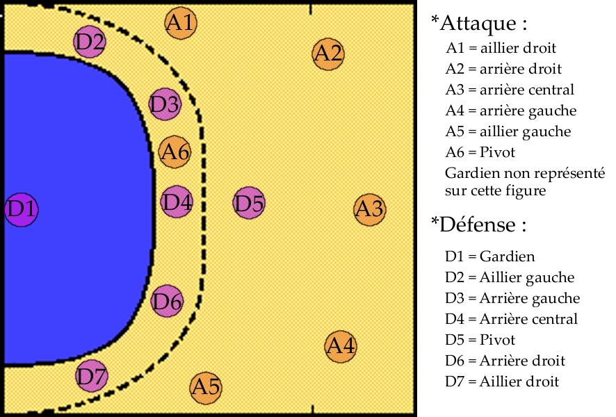 Dispositif couramment utilisé au handball